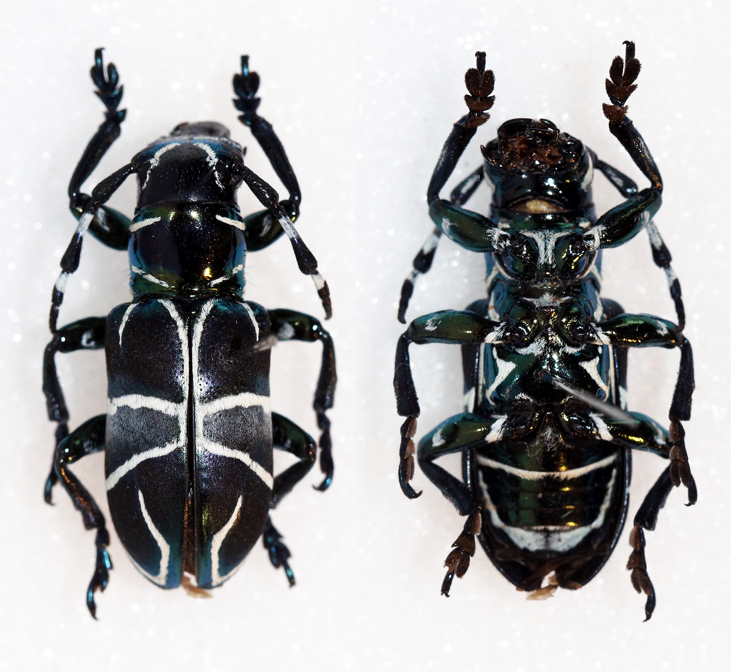 Schultze,1917 Sex: Male Data: 11-2013 - Sierra Madre - Quirino - East Luzon - Philippines Size: ?